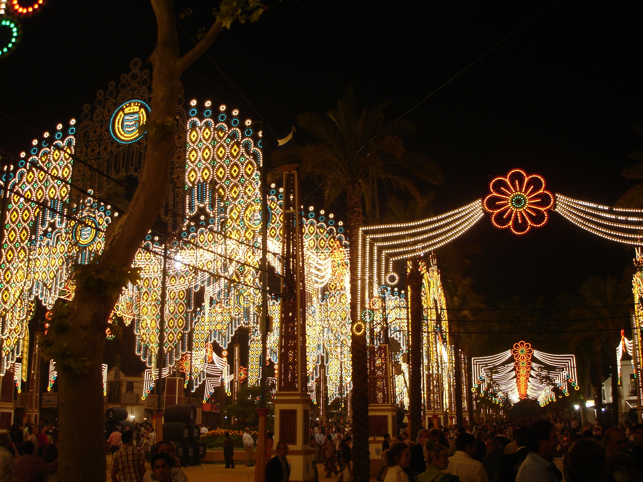 Feria del Caballo de Jerez (Andalucía, Spain)